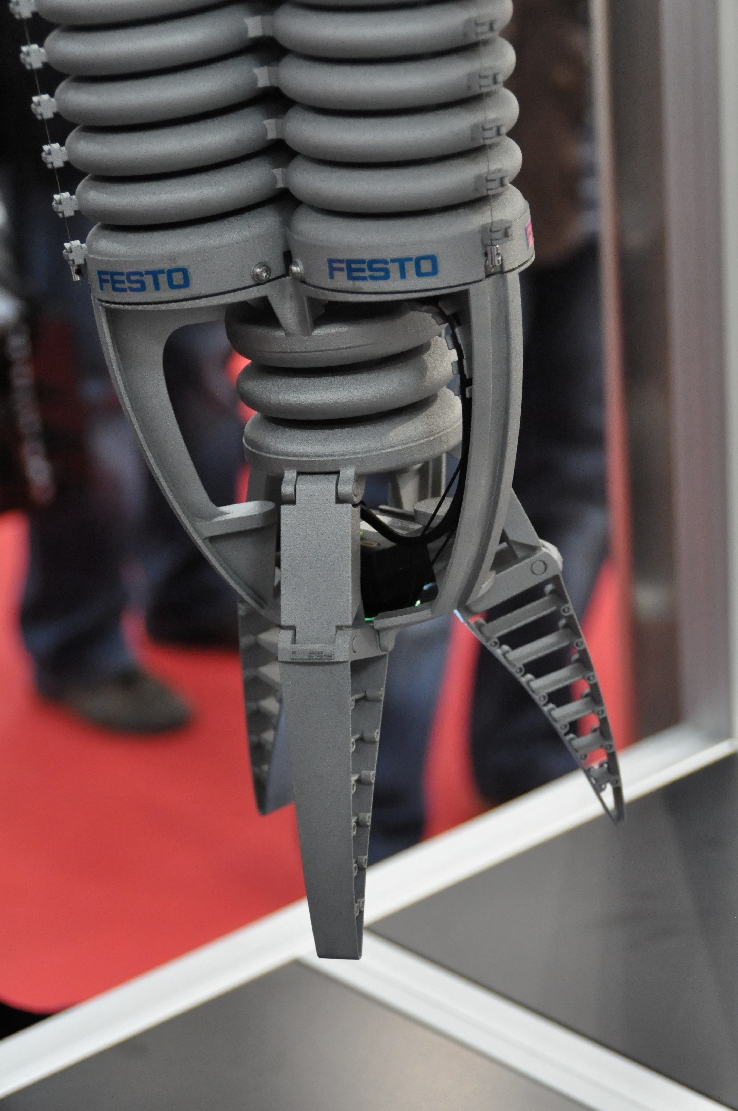 Hannover-Messe April 2012 Dieses Foto entstand durch die Mithilfe des gemeinnützigen Vereins Skillshare bei der Akkreditierung als Fotograf. Infos unter skillshare.eu Skillshare e.V. ist ein eingetragener gemeinnütziger Verein zur Förderung der Bildung durch Unterstützung der Erstellung, Sammlung und Verbreitung so genannten freien Wissens. IBAN: DE16 8306 5408 0004 8850 66 BIC: GENODEF1SLR Bank: VR-Bank Altenburger Land